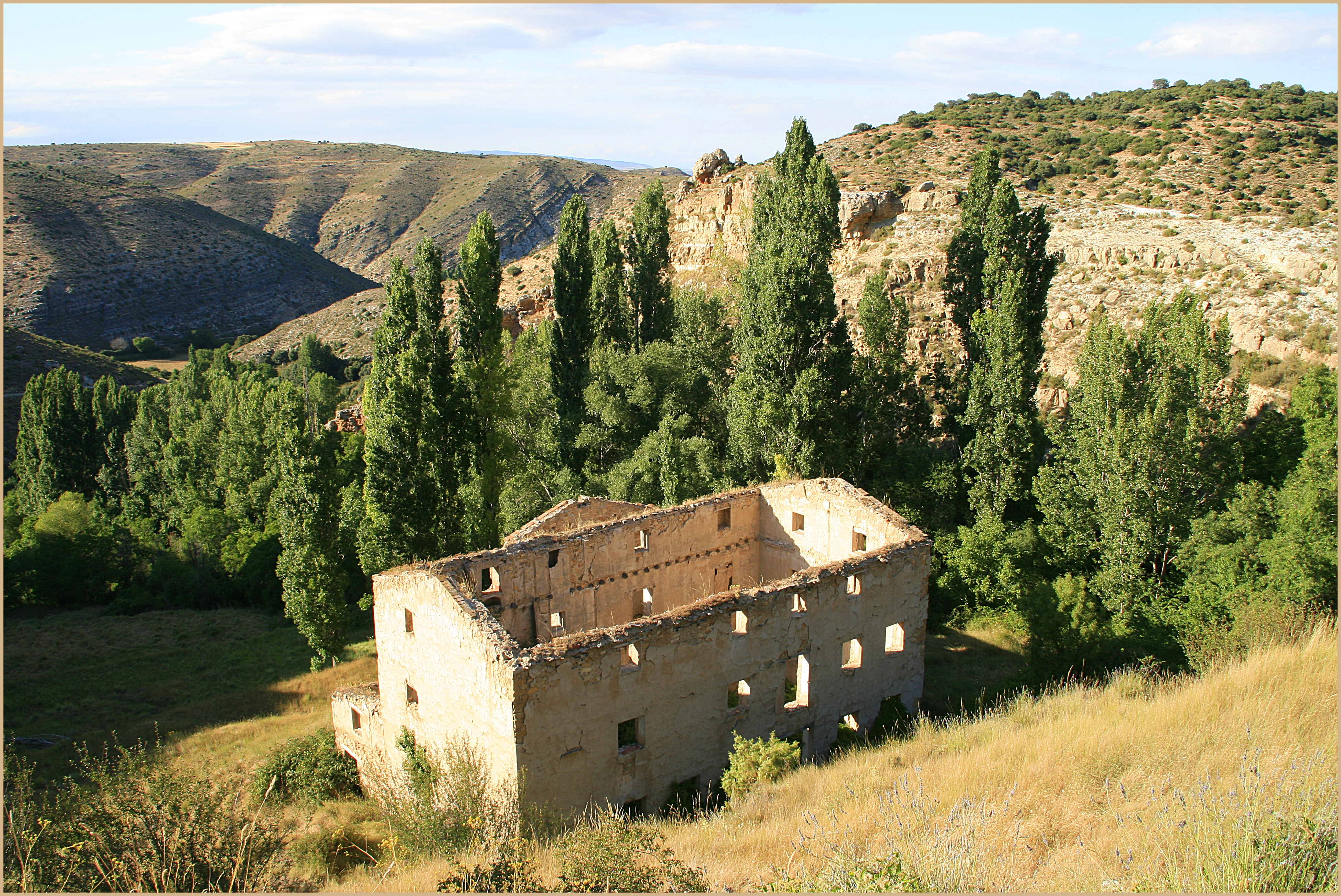 Antigua fábrica de luz.En esta zona del río Añamaza,en menos de 2 kilómetros el río salva un desnivel de 190 metros.Aprovechando este desnivel,se creó en el siglo pasado la central eléctrica o fábrica de luz,como la llaman por aquí.Por aquí el rió forma numerosas cascadas ocultas entre la exuberante vegetación.